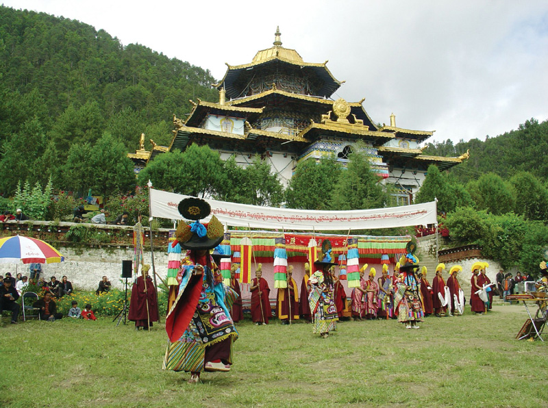 西藏林芝-喇嘛岭寺